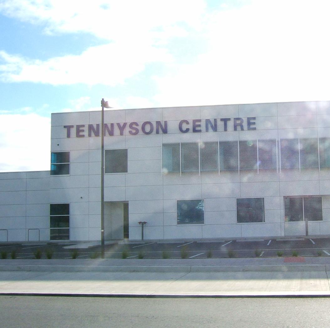 Tennyson Centre